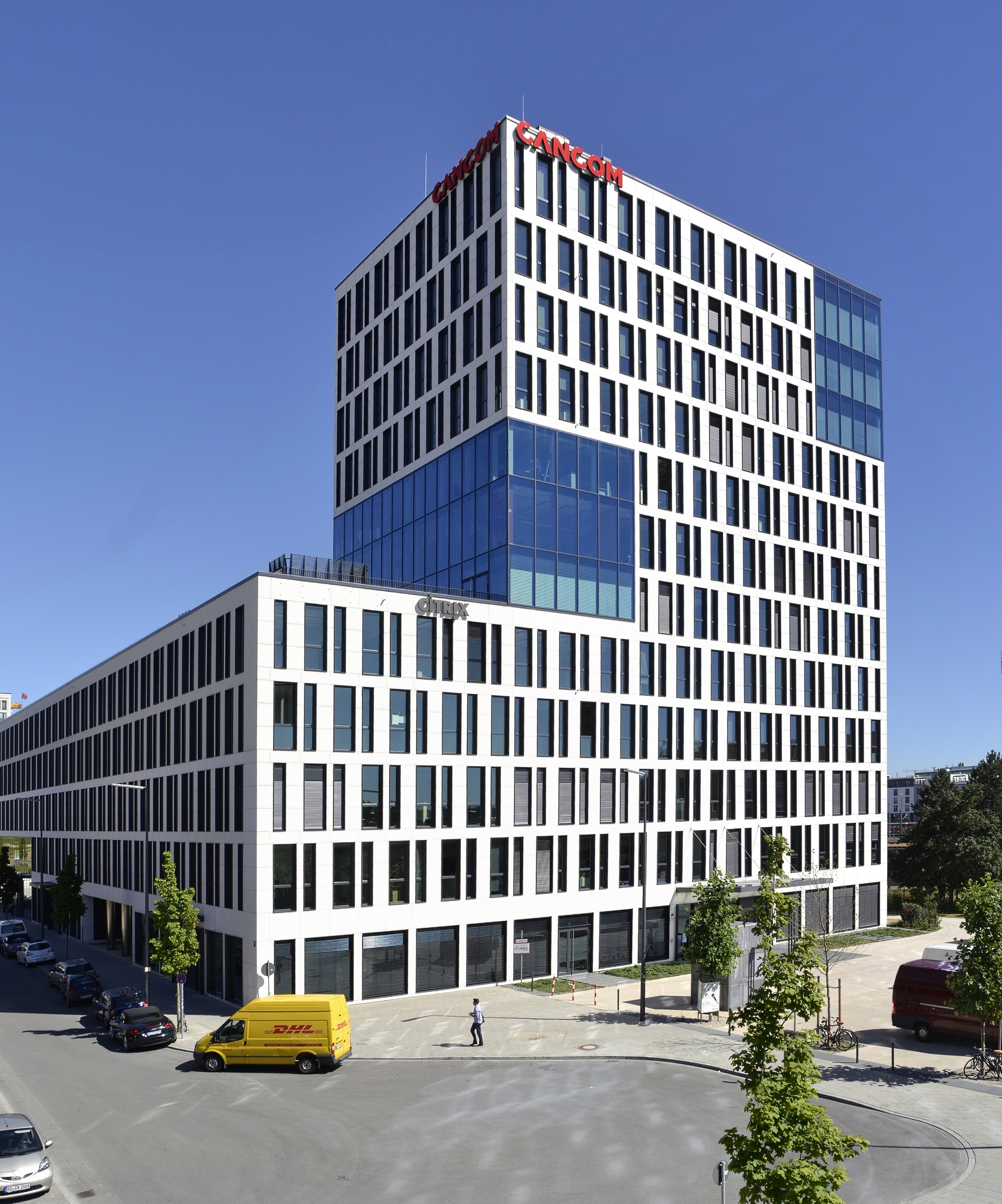 Die CANCOM Zentrale Deutschland in der Erika-Mann-Straße 69 in München, Bayern.